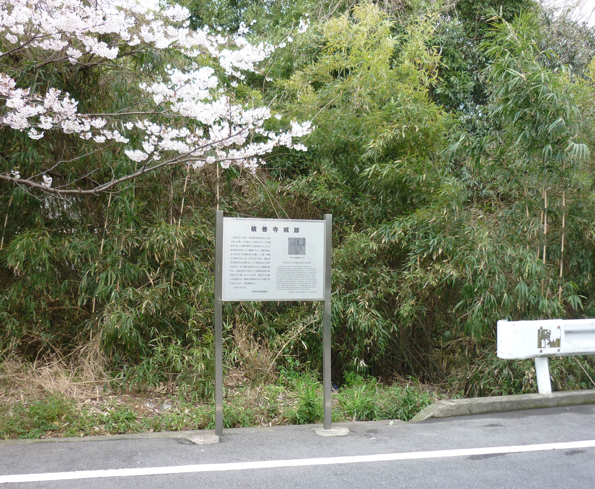 積善寺城の案内看板